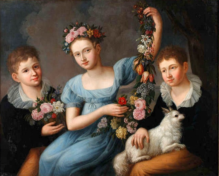 Portret zbiorowy dzieci Kopffów